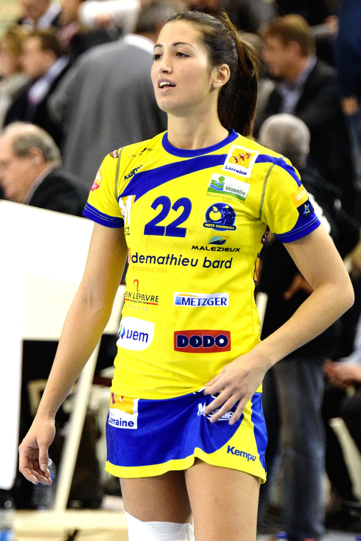 Lara González Ortega , lors de la rencontre de la 10e journée en Issy Paris Hand et Metz Handball, le 12 novembre 2014. Au stade Robert Carpentier à Issy les moulineaux.